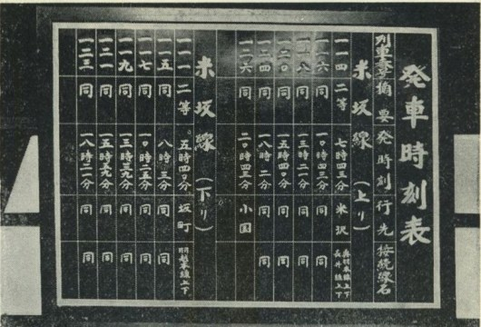 米坂線玉川口駅の時刻表